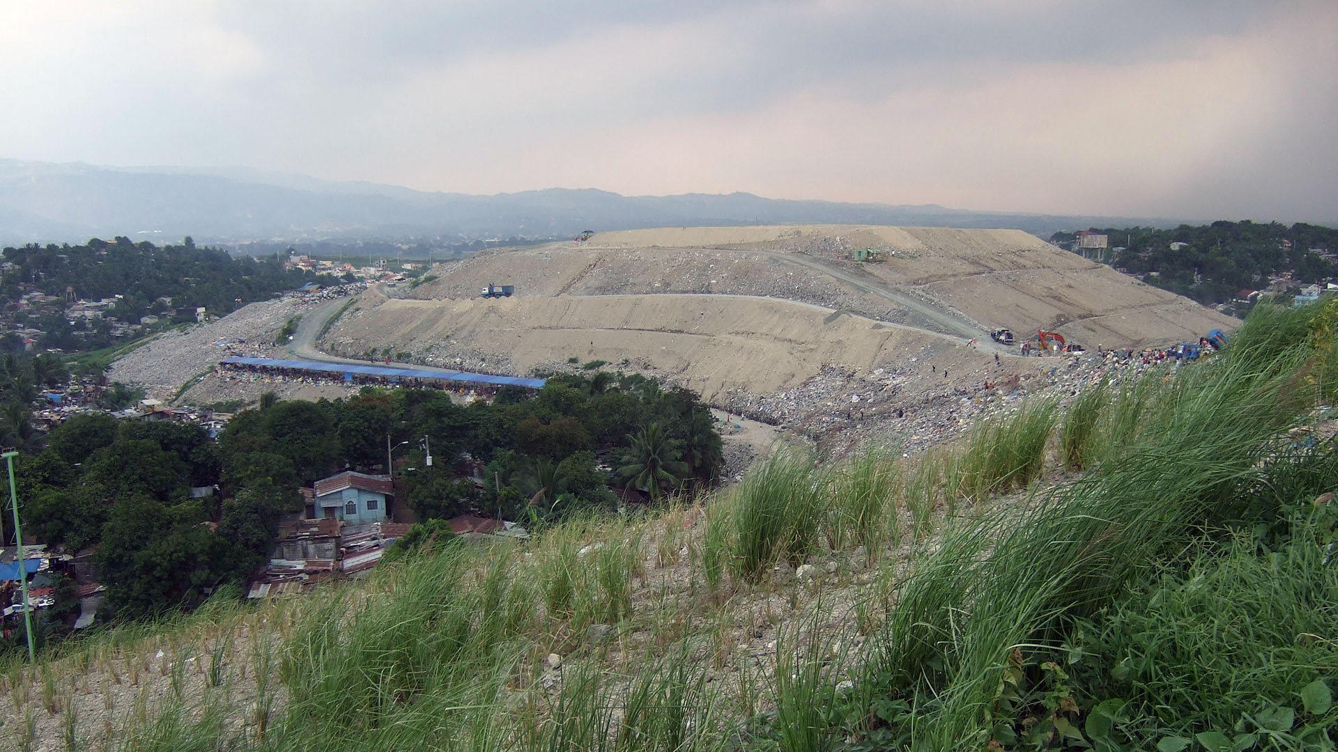 Payatas Dumpsite, Metro Manila, Philippines